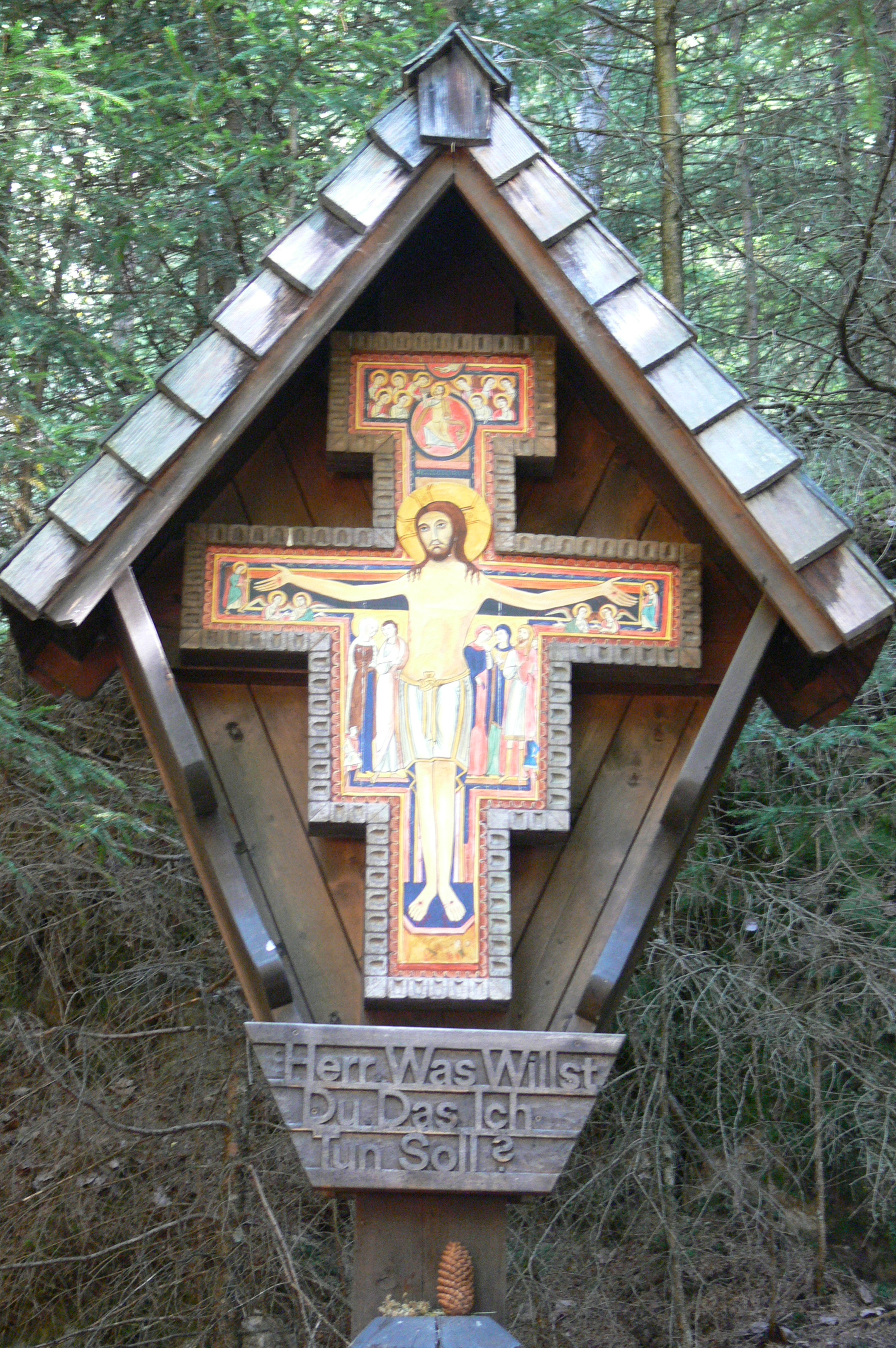 Franziskusweg Ahrntal/Rainbach - Franziskus-Kreuz